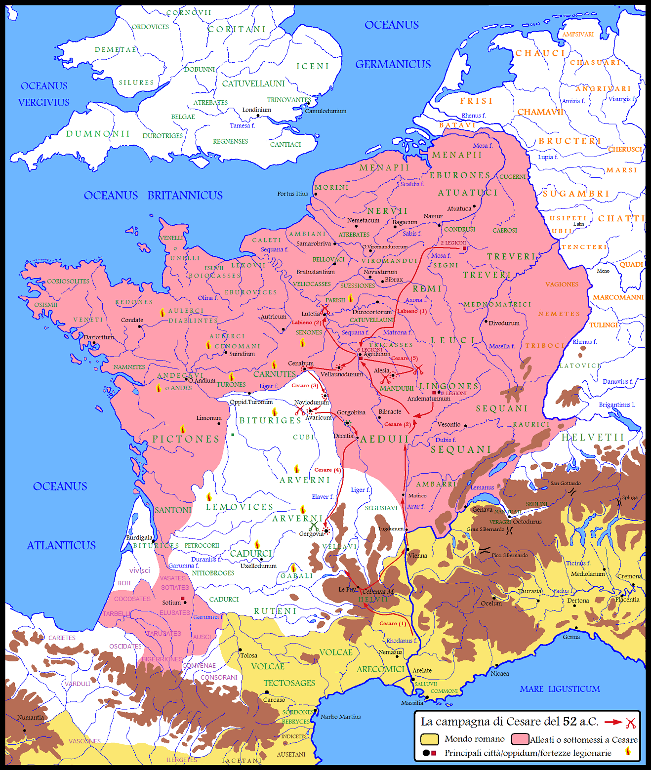 La Gallia nel corso del settimo anno di campagne militari di Cesare.